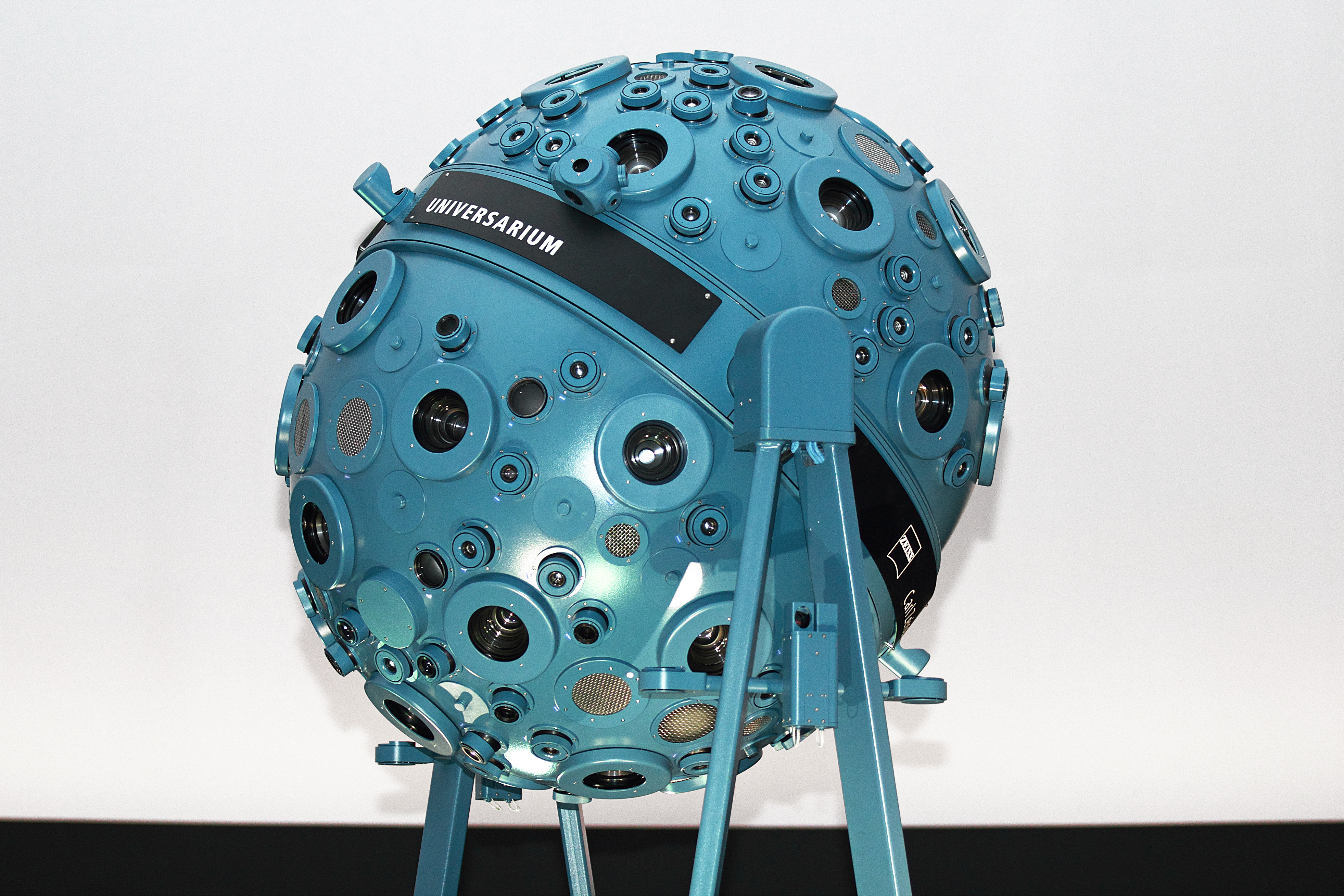 Verleihung des Schallwelle-Musikpreises am 10. März 2012. Kuppel des Planetariums Bochum. Eröffnungsveranstaltung. Blick auf das Universarium.